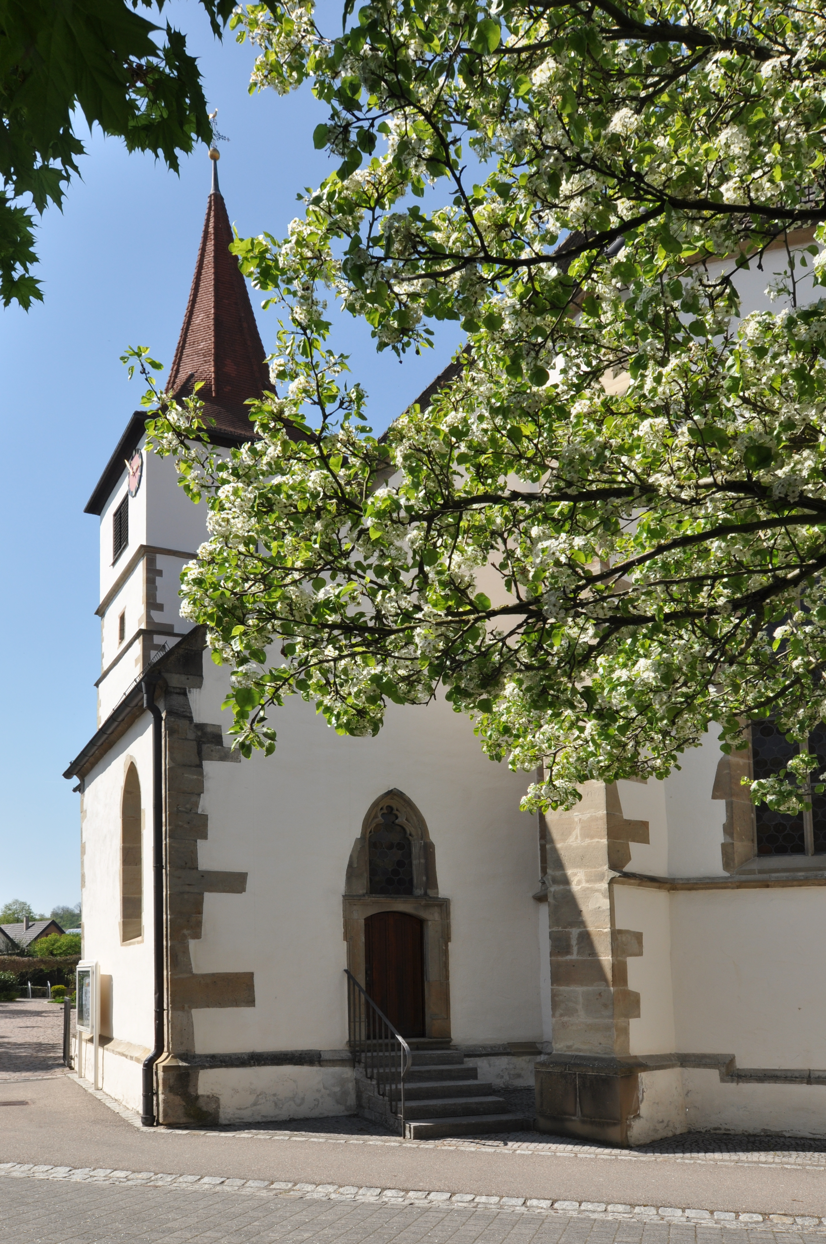 Kilianskirche in Bissingen an der Enz, Ansicht von Südosten